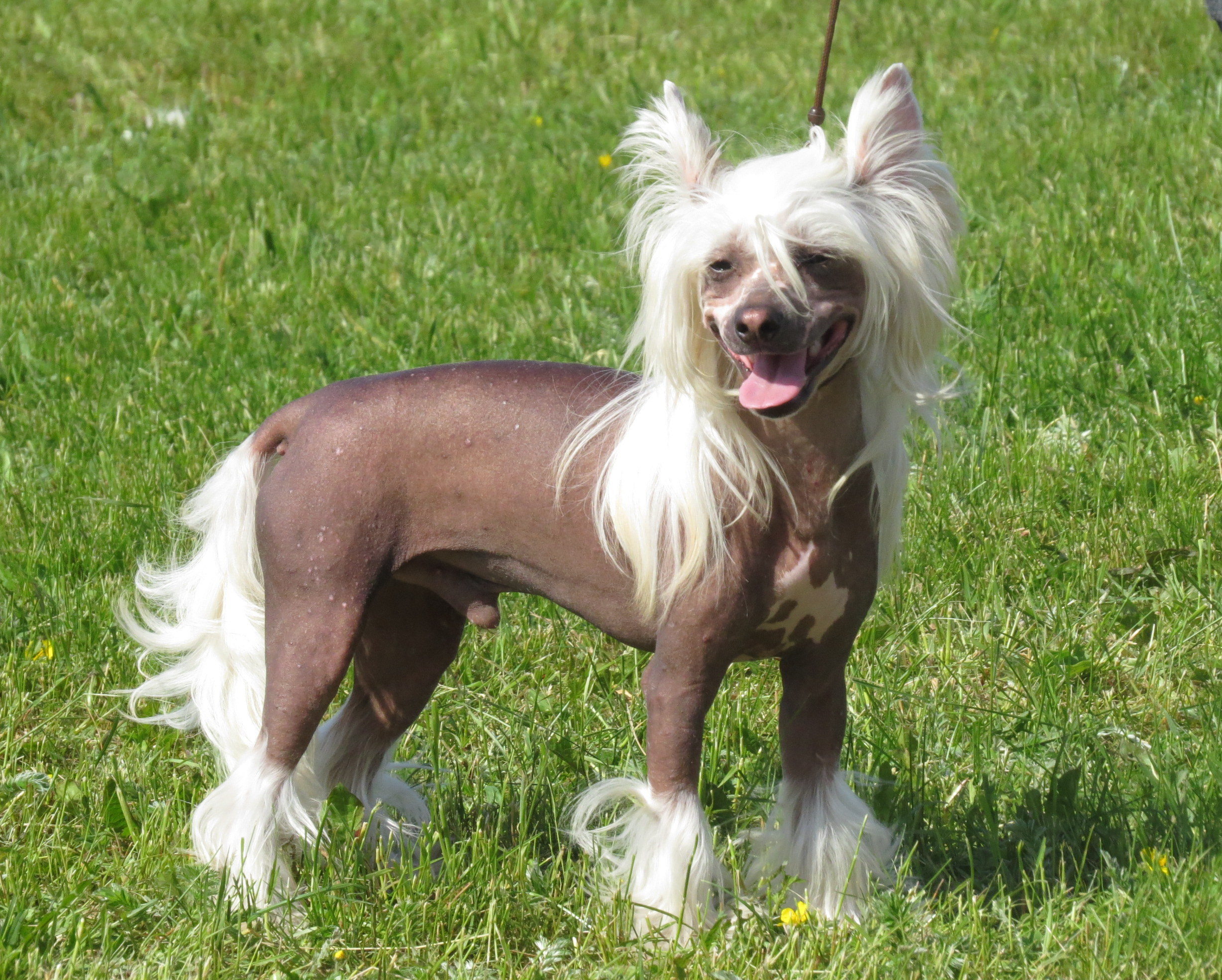 Moletai May 2014